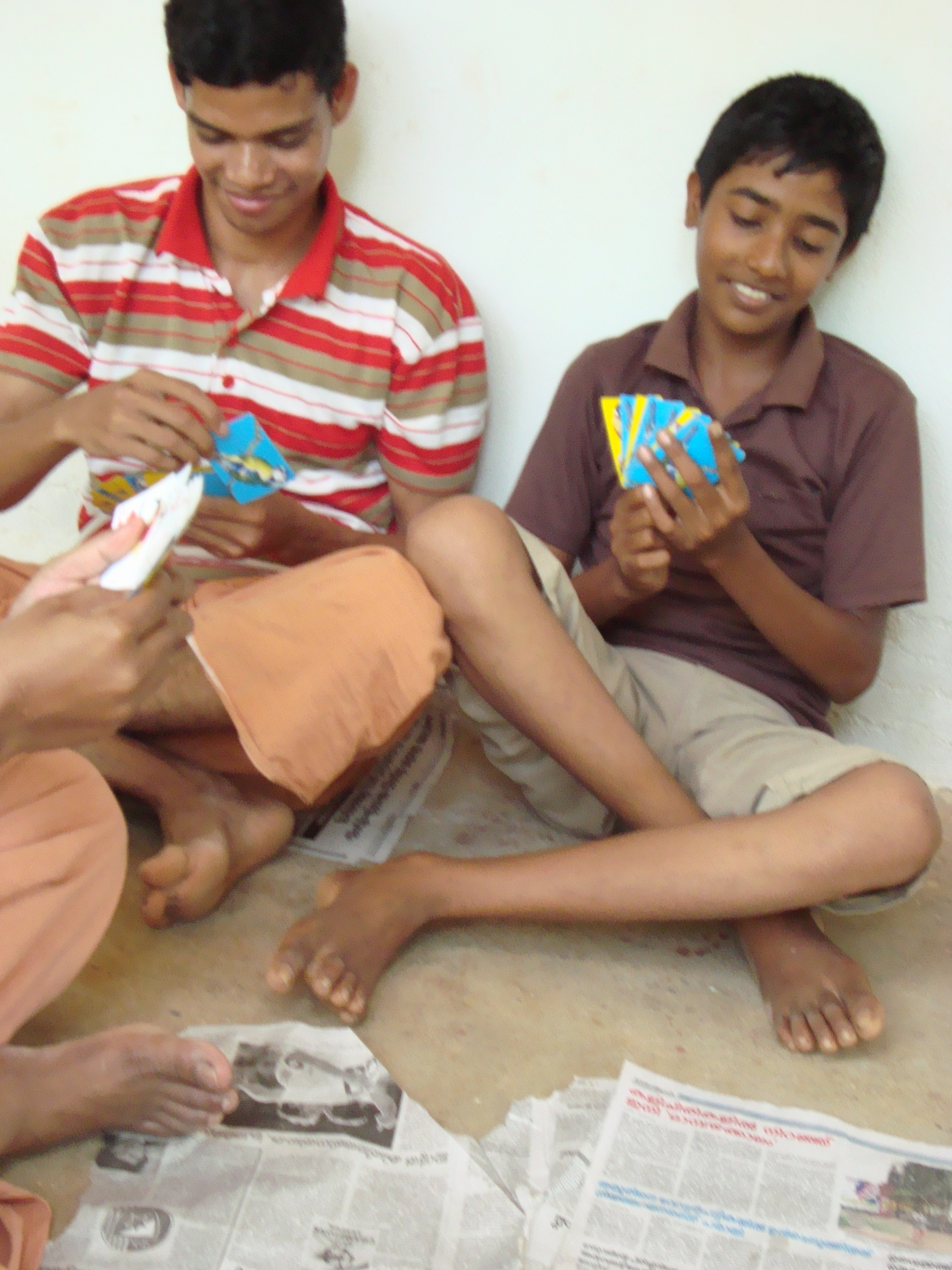 ചീട്ടുകളി